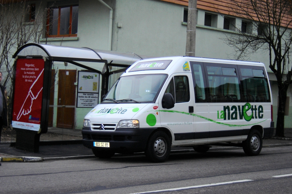 Une des Navettes gratuites du centre-ville d'Epinal.